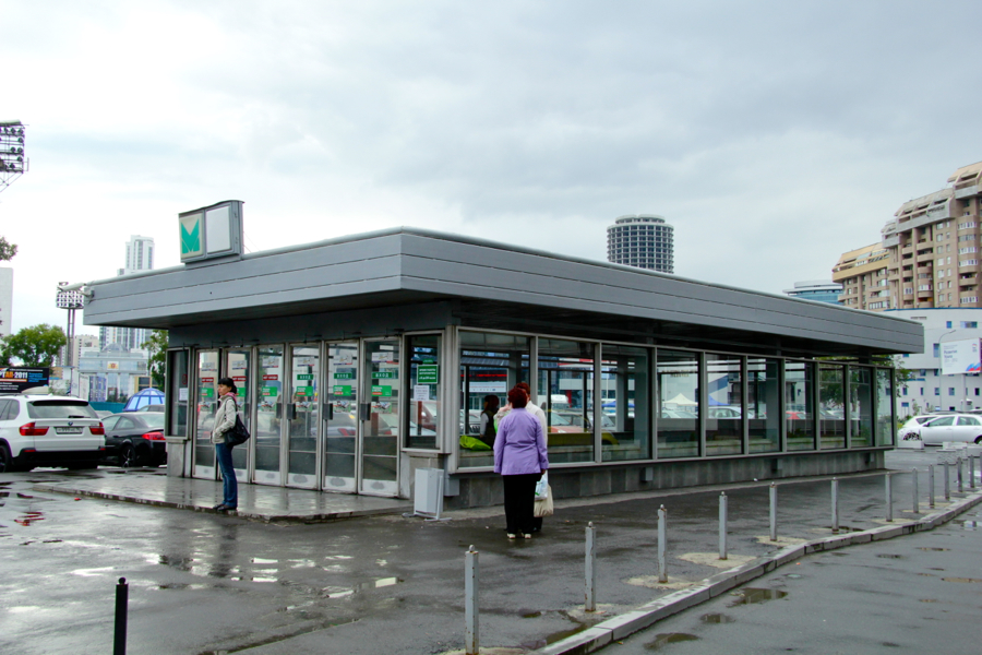 Yekaterinburg Metro (Екатеринбургский метрополитен)